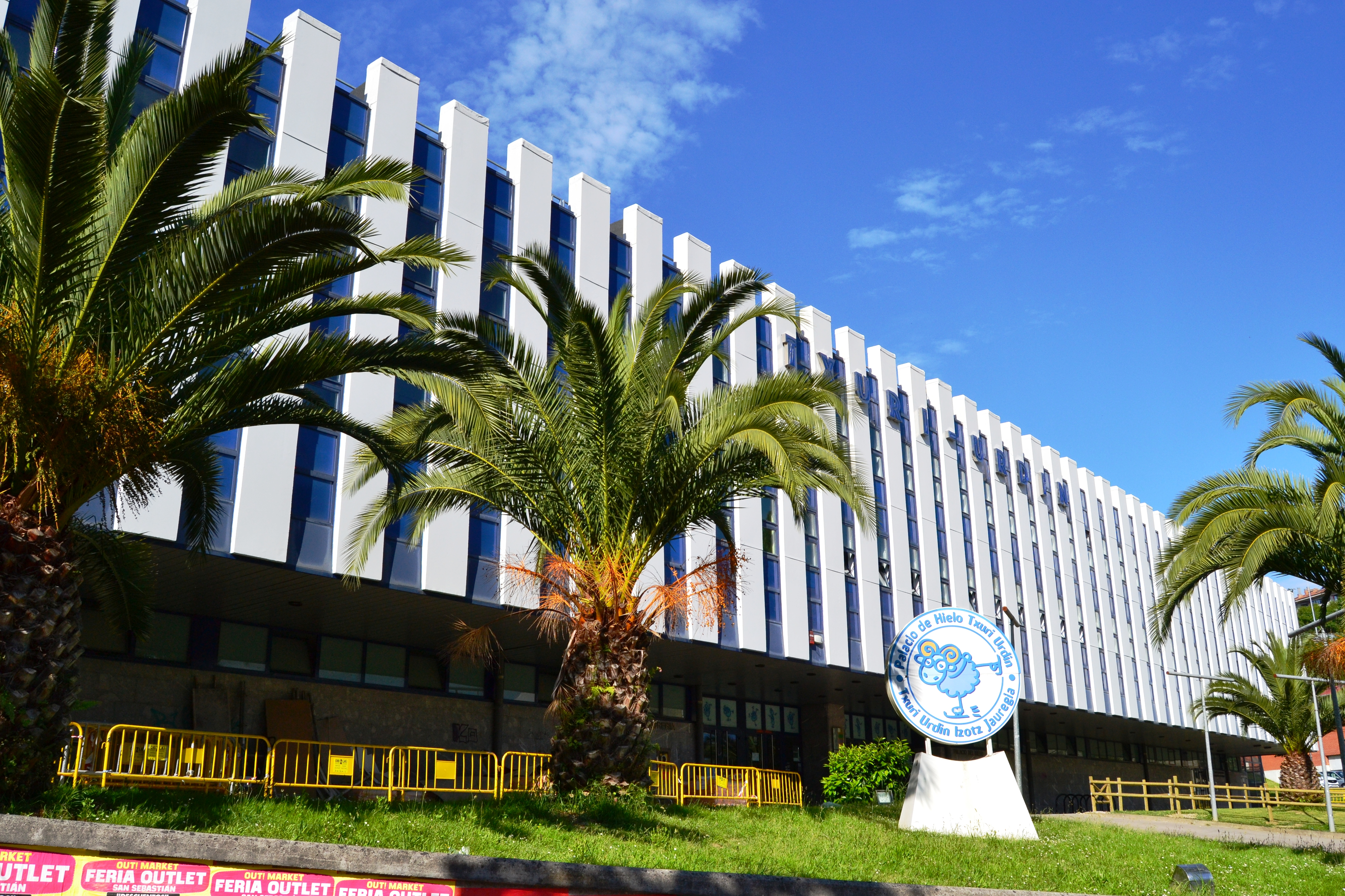 Txuri Urdin izotz jauregia